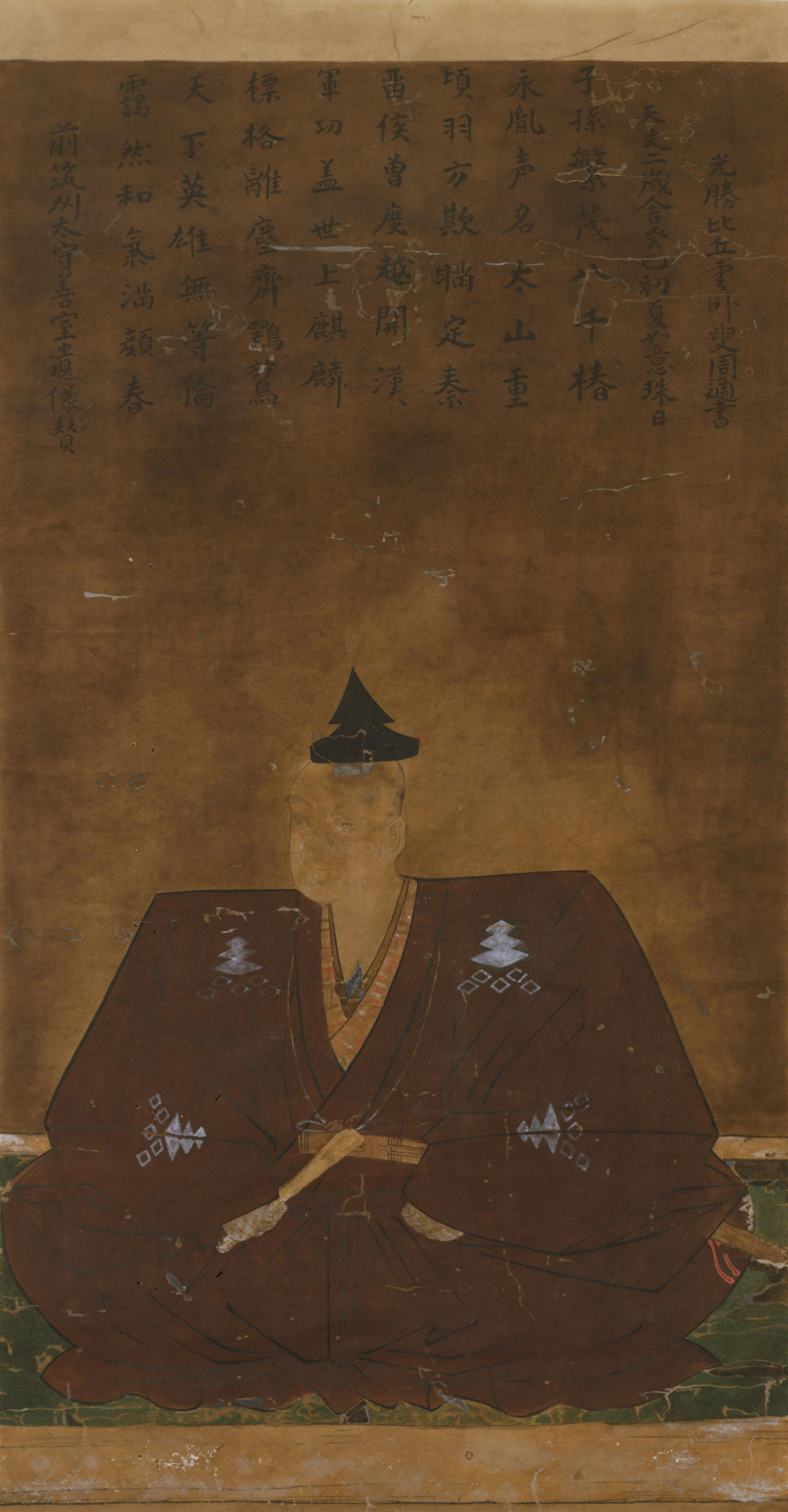 三好長基画像